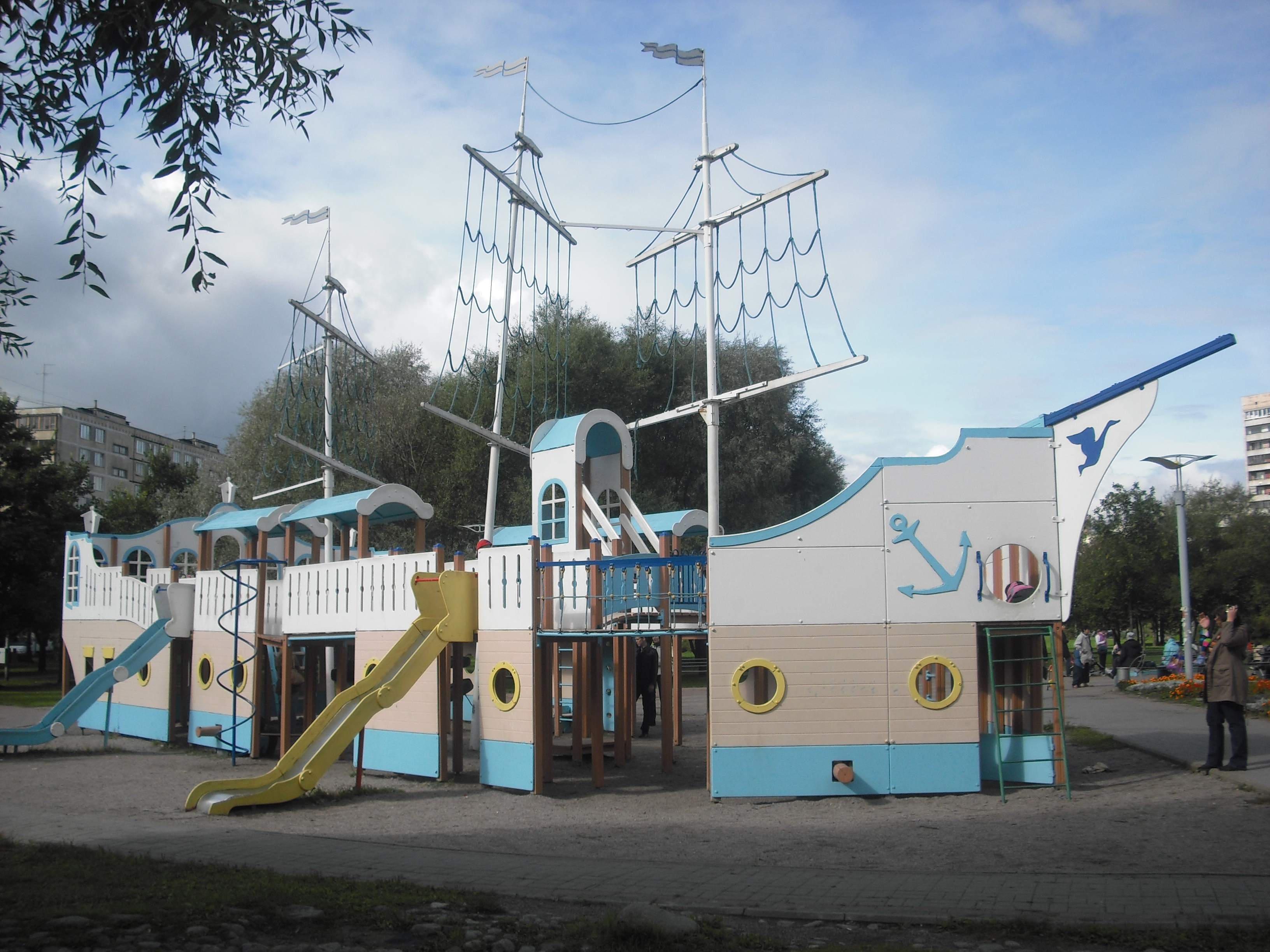 Игрушечная копия фрегата "Суомен Йоутсен" на ул. Турку в Санкт-Петербурге